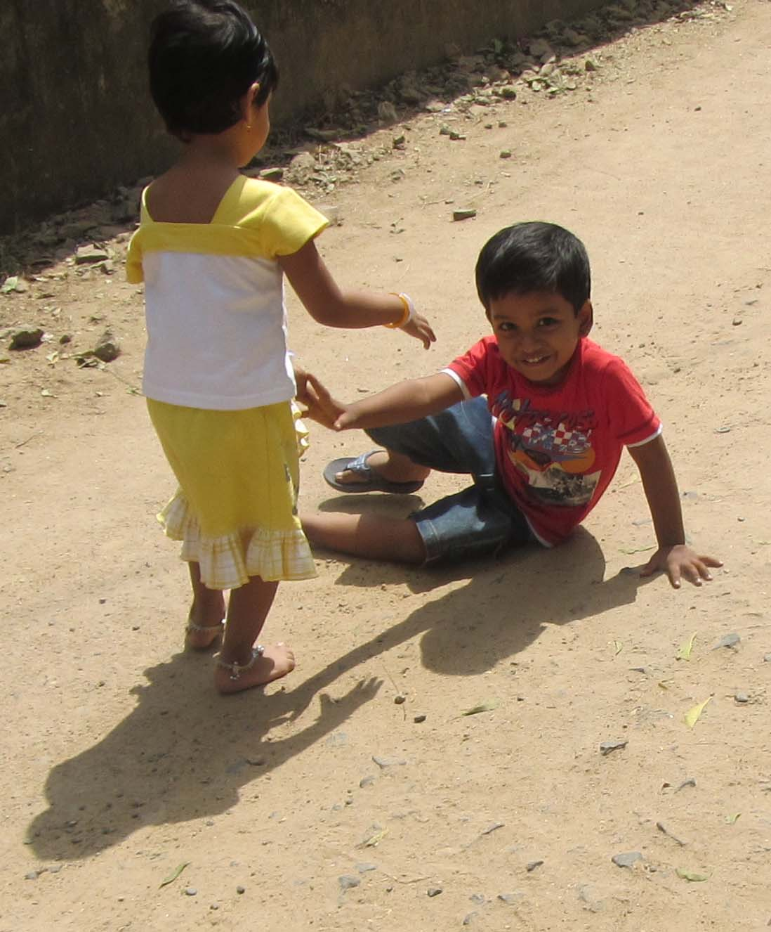 own shot - துரத்திப்பிடி விளையாட்டில் உட்கார்ந்துகொண்டிருப்பவரைத் தொடக்கூடாது.